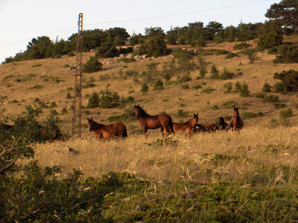 Spil Millî Parkı - yılkı atları - at alanı